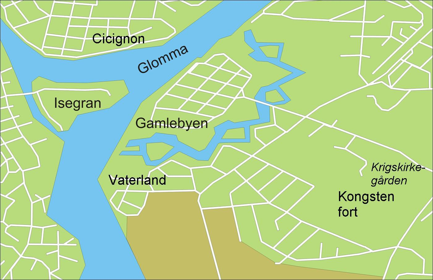 Kart over Fredrikstad festning med utenverk (Cicignon, Isegran, Kongsten) og Vaterland.